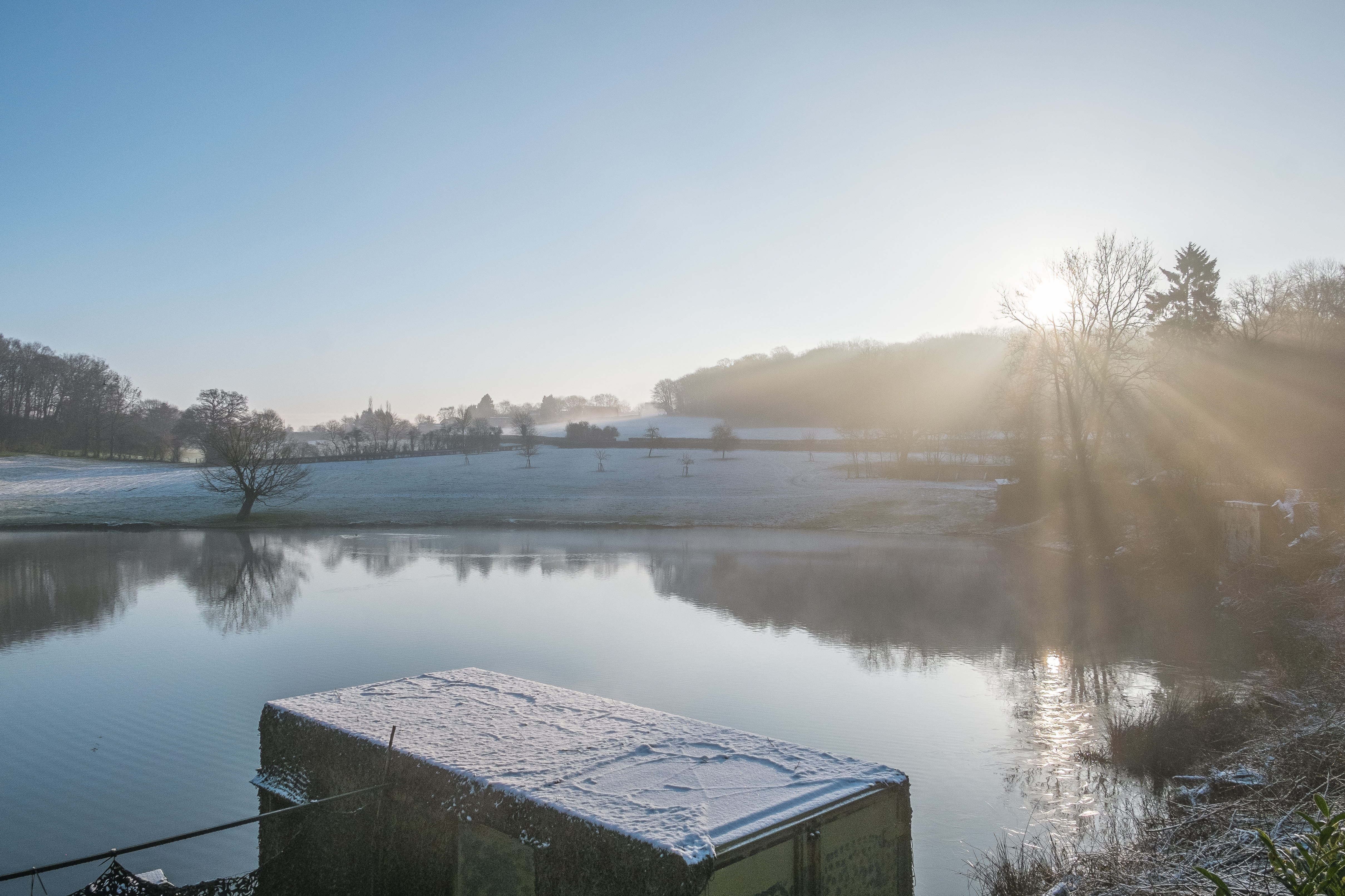 Un peu de neige, fort rare par ici au cours du dernier hiver, était venue recouvrir les décors avesnois en cette fin février. Elle fut bien éphémère...